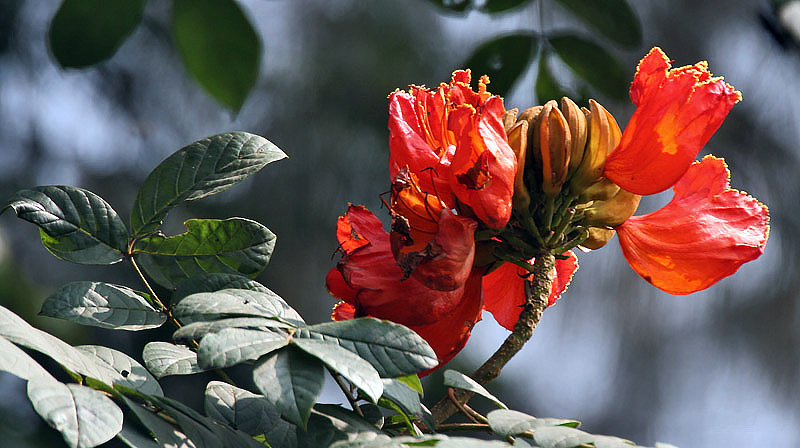 African Tulip Tree Spathodea campanulata in Kolkata, West Bengal, India.